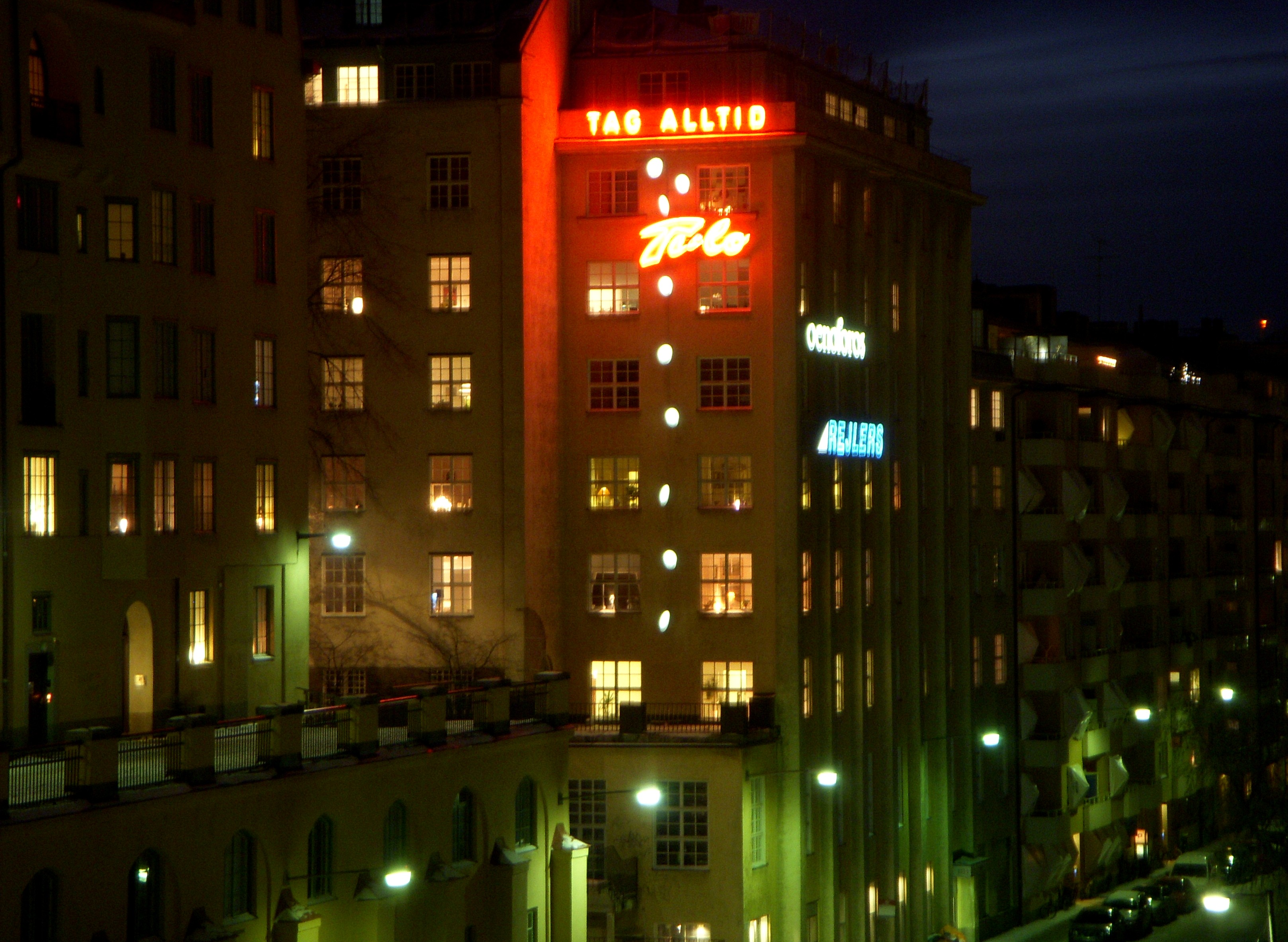 Tuloskylten kvällstid